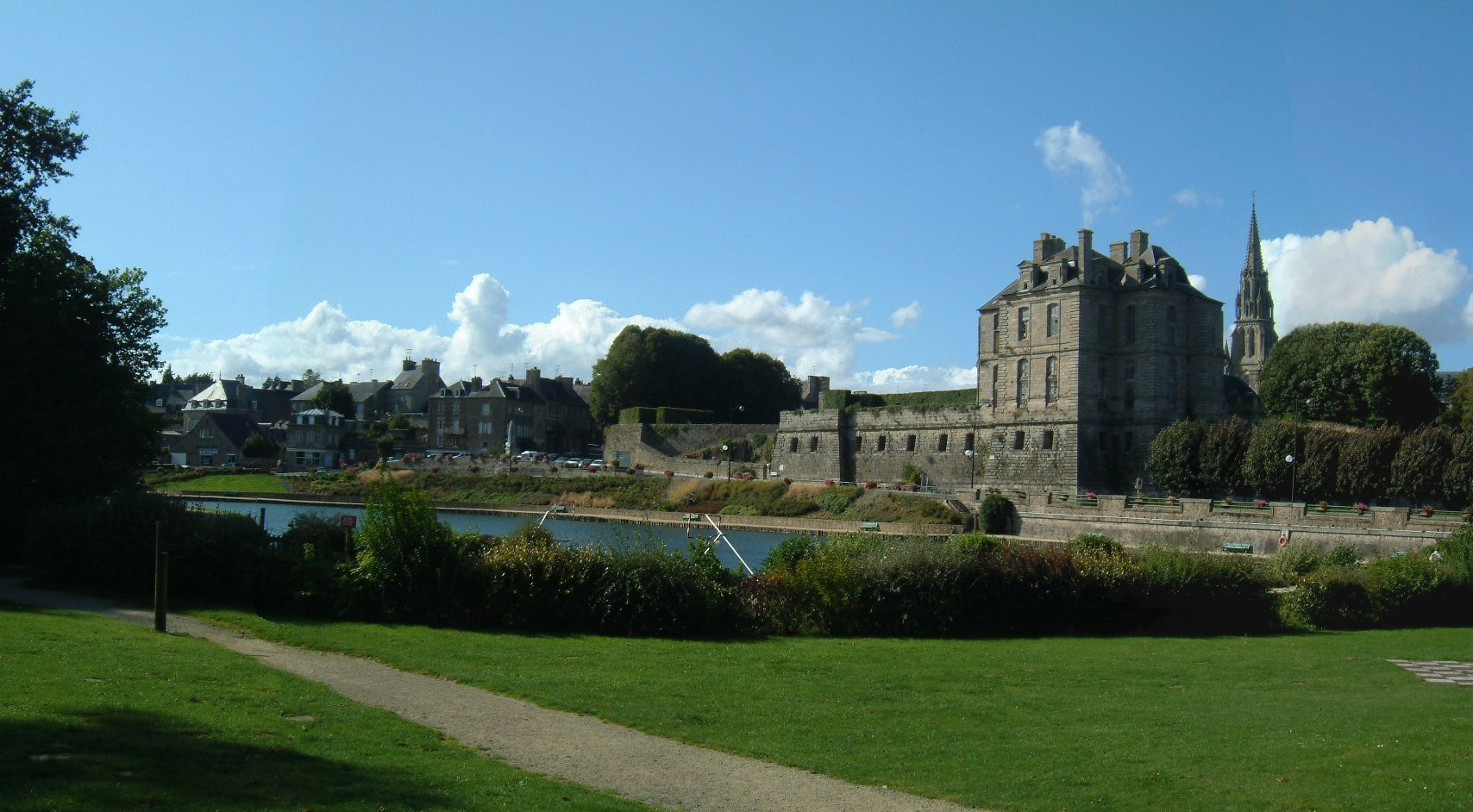 Panorama de la ville de Quintin avec le lac, le chateau en face et la basilique sur la droite